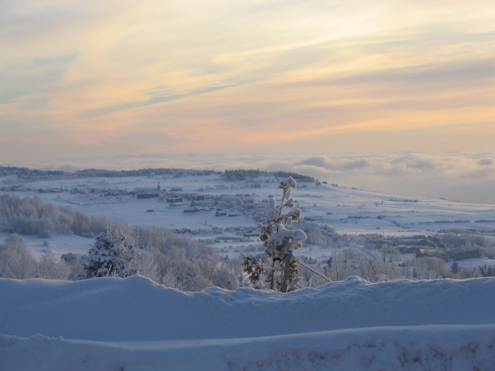 Les Éboulements à l'aube l'hiver est une photo du village des Éboulements, (Conté de Charlevoix, Québec, Canada) qui a été prise au petit matin alors qu'une fine neige recouvrait les arbres dont un frima glaçait les branches.